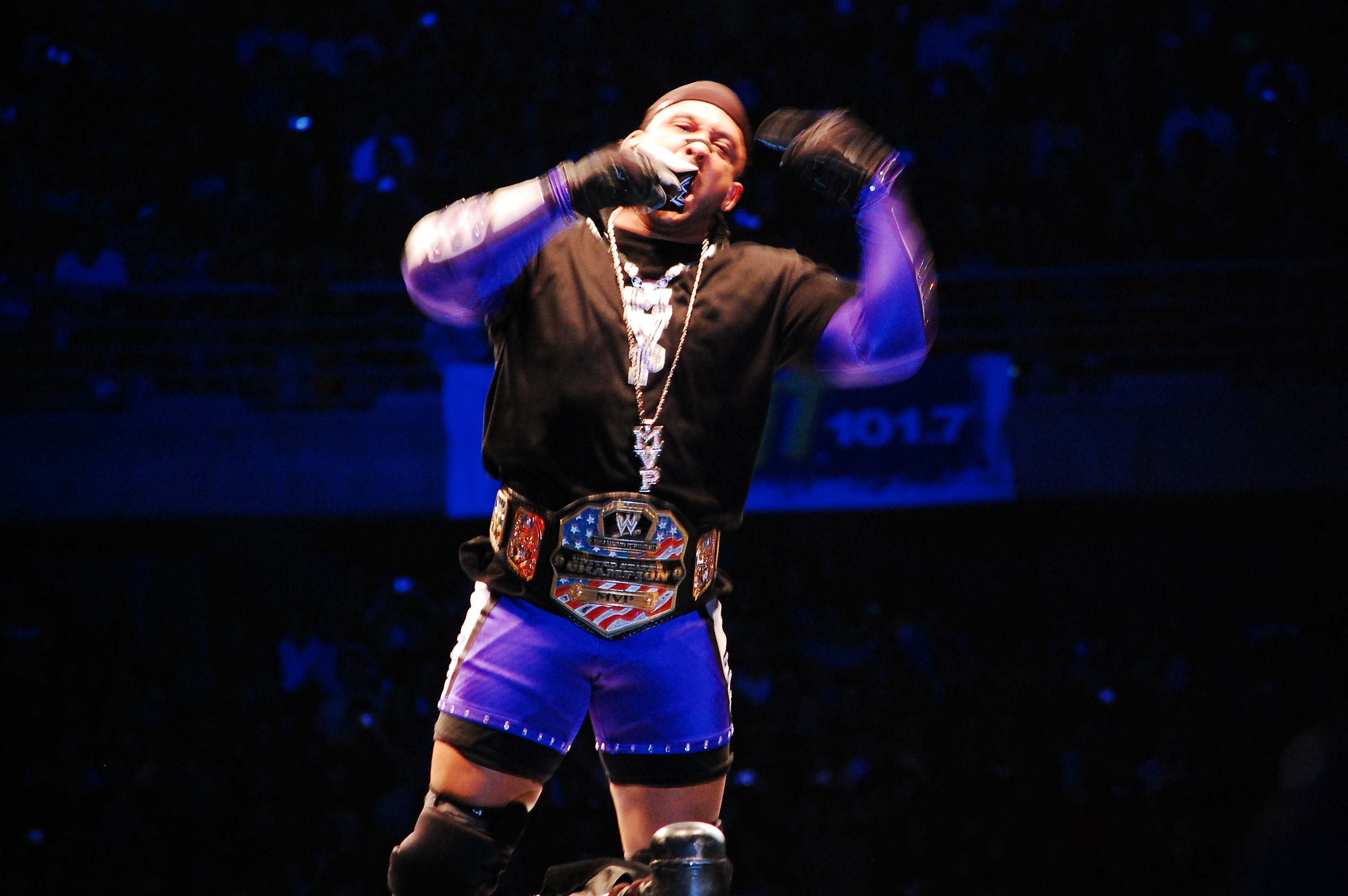 mvp retando al publico